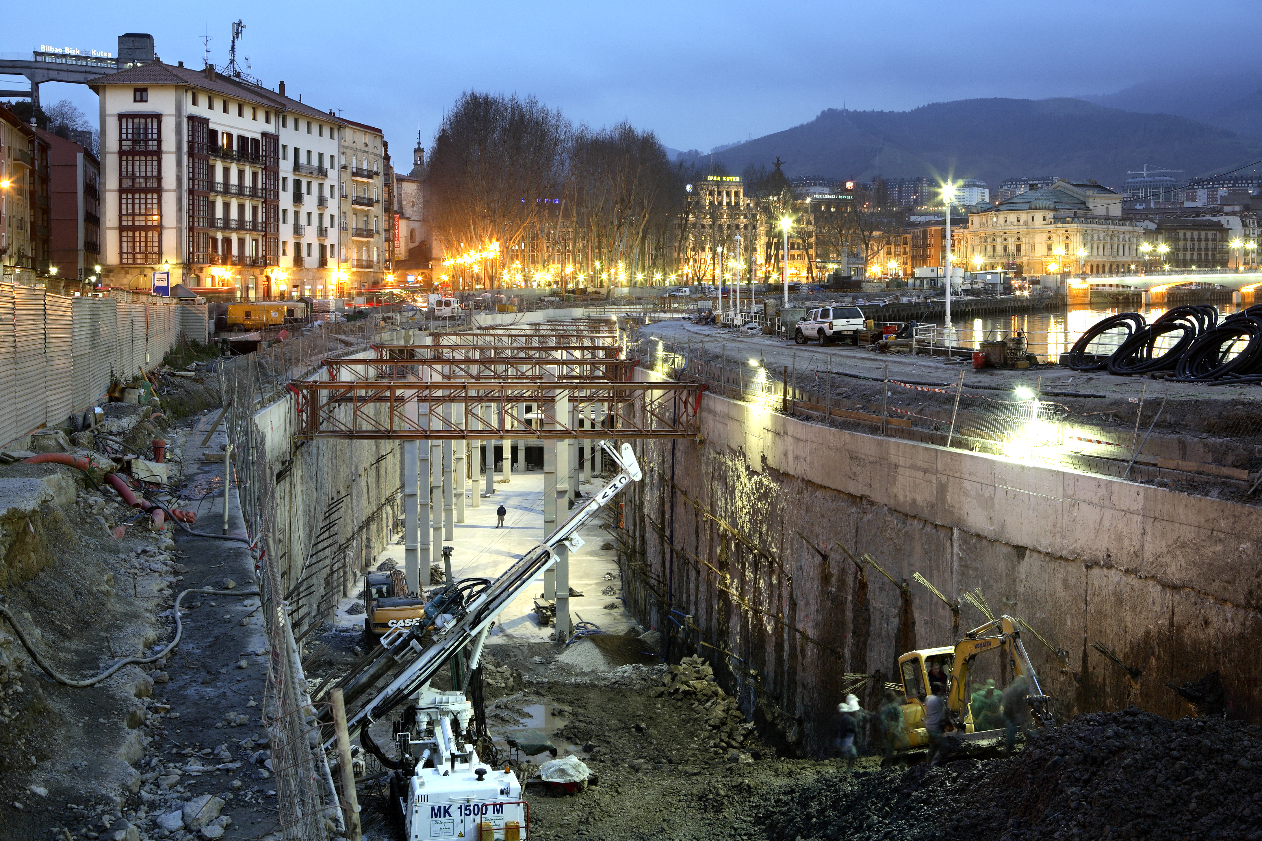 Parking Arenal (Bilbao)